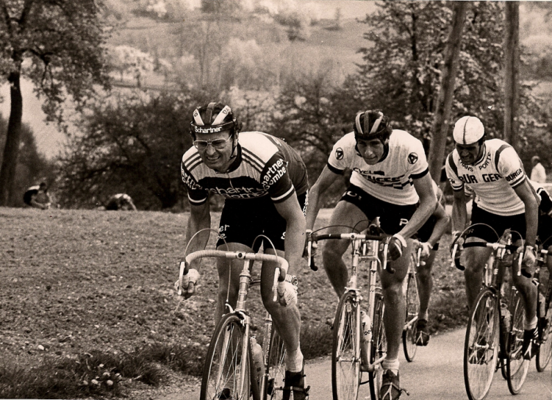 Kirschblütenrennen 1977 - Mistelbacherberg Bergwertung. Sturzring, Stahlclips an den Pedalen, der Führende hat Vorderbremshebel rechts